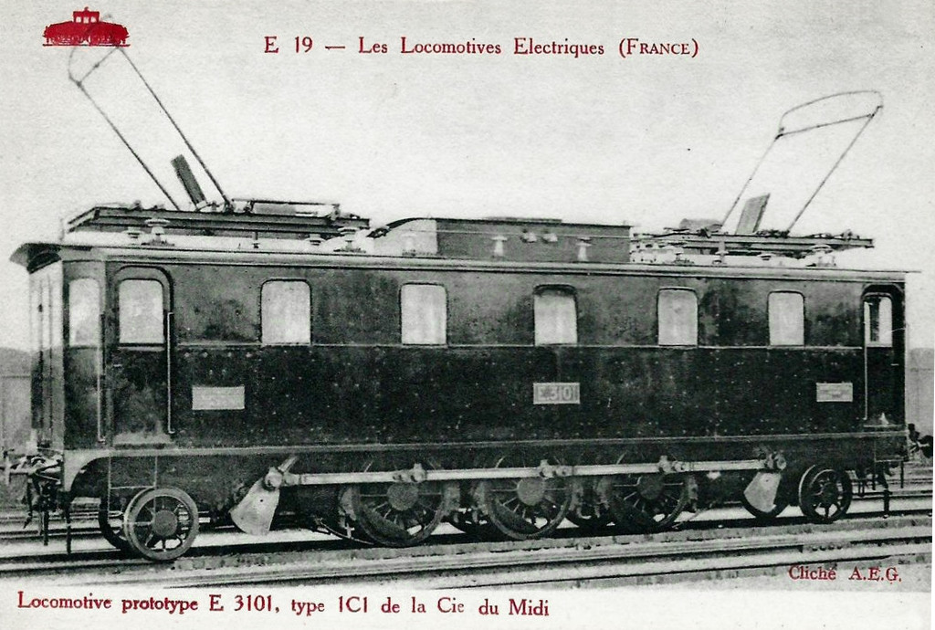 Midi E 3101, type 1C1 de la Compagnie du Midi avec type pantographe AEG à Bitterfeld en Allemagne - Constructeurs AEG et Henschel-Sohn